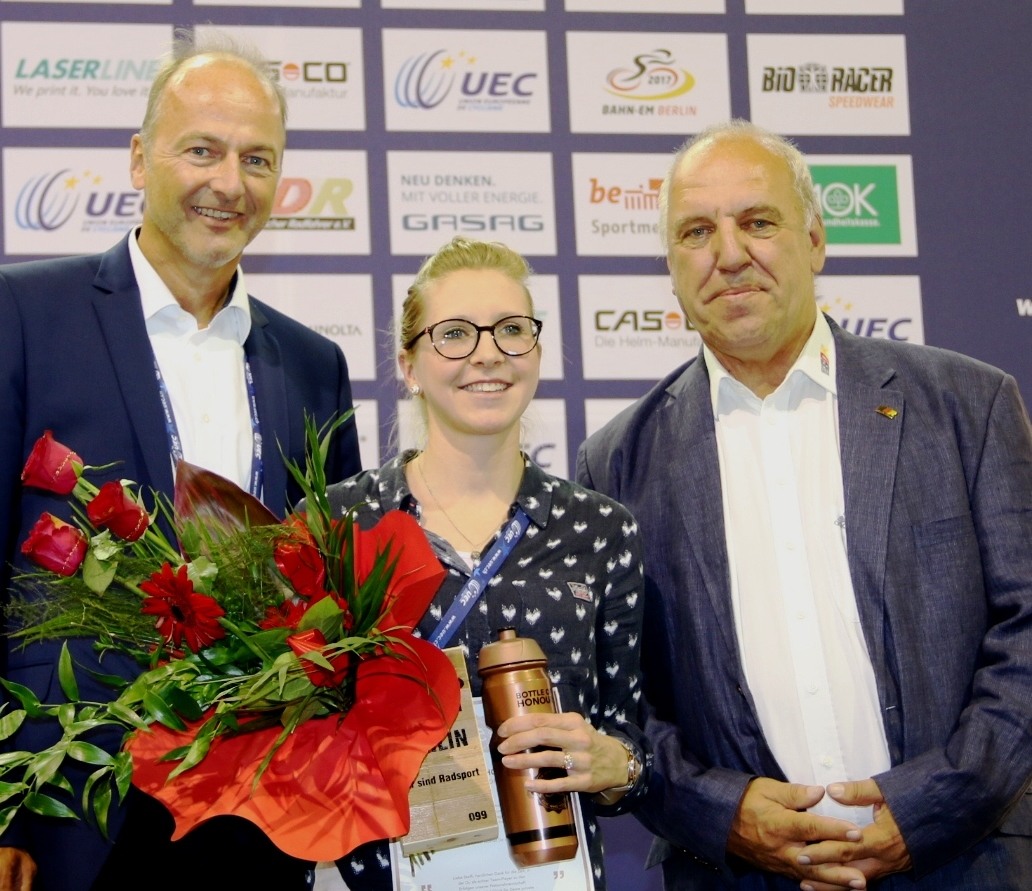 Verabschiedung von Stephanie Graumnitz, geb. Pohl. Links: Martin Wolf, Generalsekretär BDR, r. Günter Schabel, Viez-Präsident BDR